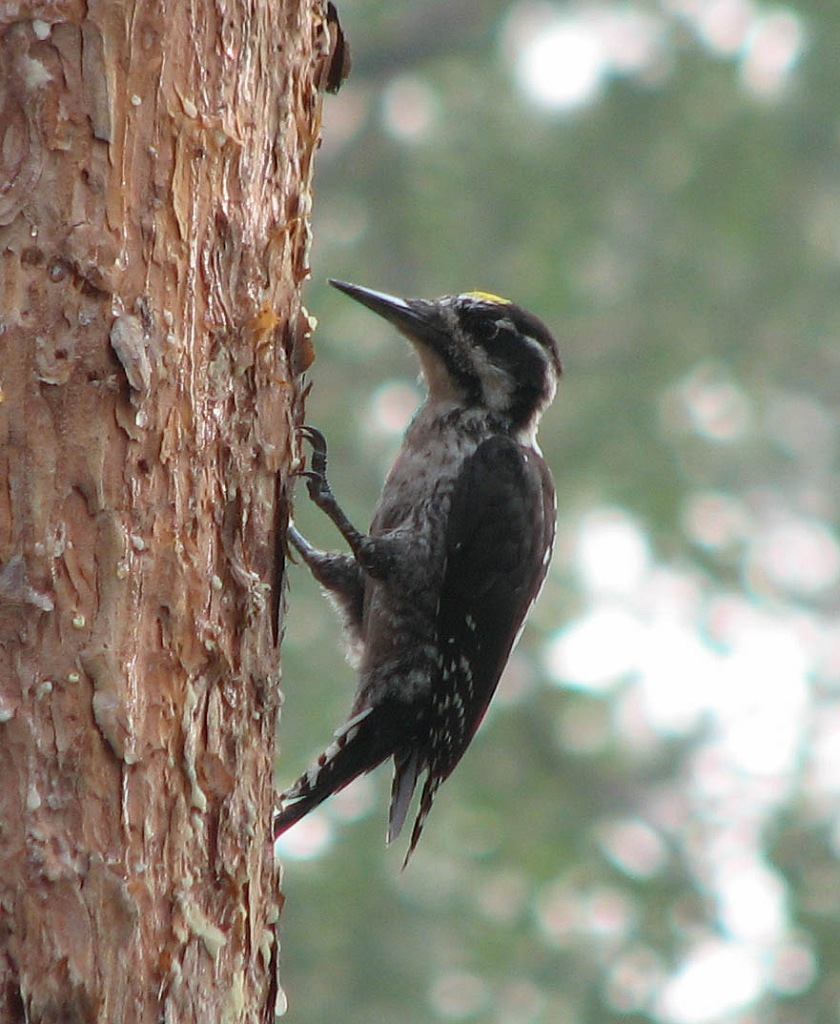 Болото Варех и озеро Варех: От районного центра г. Володарска на северо-запад 30 км, от г. Дзержинска на северо-запад 38 км, от п. Фролищи на юго-восток 3 км, от п. Мулино на северо-запад 8 км,Володарский район, Нижегородская область This image is related to the protected area of Russia number 5210136